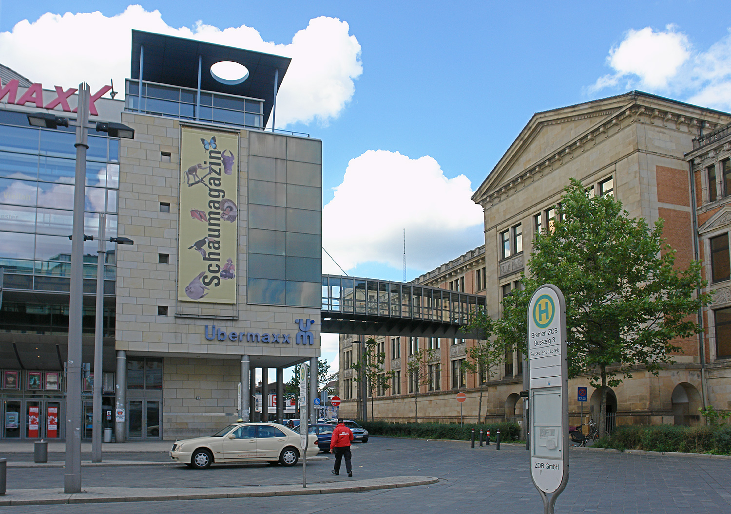 Großkino CinemaxX der CinemaxX AG am Breitenweg in Bremen-Mitte von 1998 mit zehn Kinosälen und 2854 Sitzplätzen. Das Übermaxx (eine Wortschöpfung aus Überseemuseum und Cinemaxx) ist das Schaumagazin des Überseemuseums